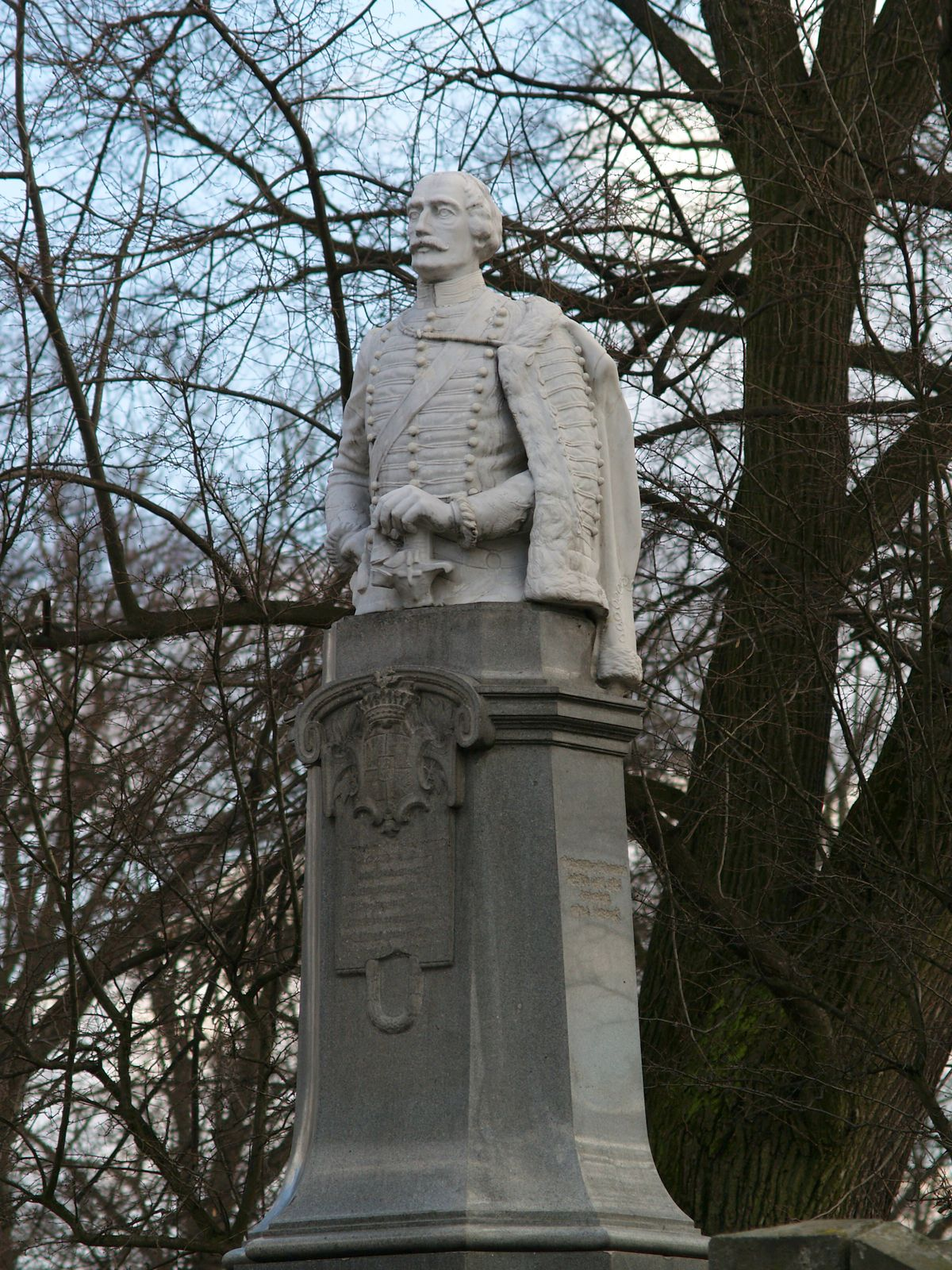 Pałac w Pławniowicach - pomnik Franciszka II von Ballestrem